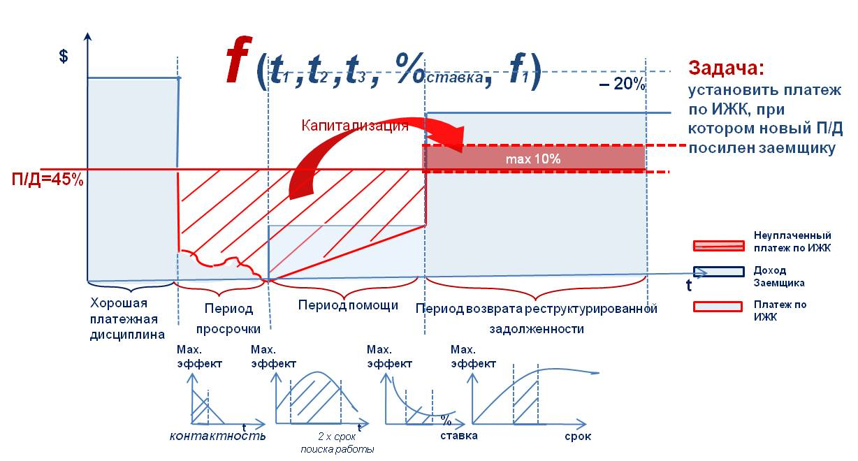 Научный подход к реструктуризации ипотечного кредита